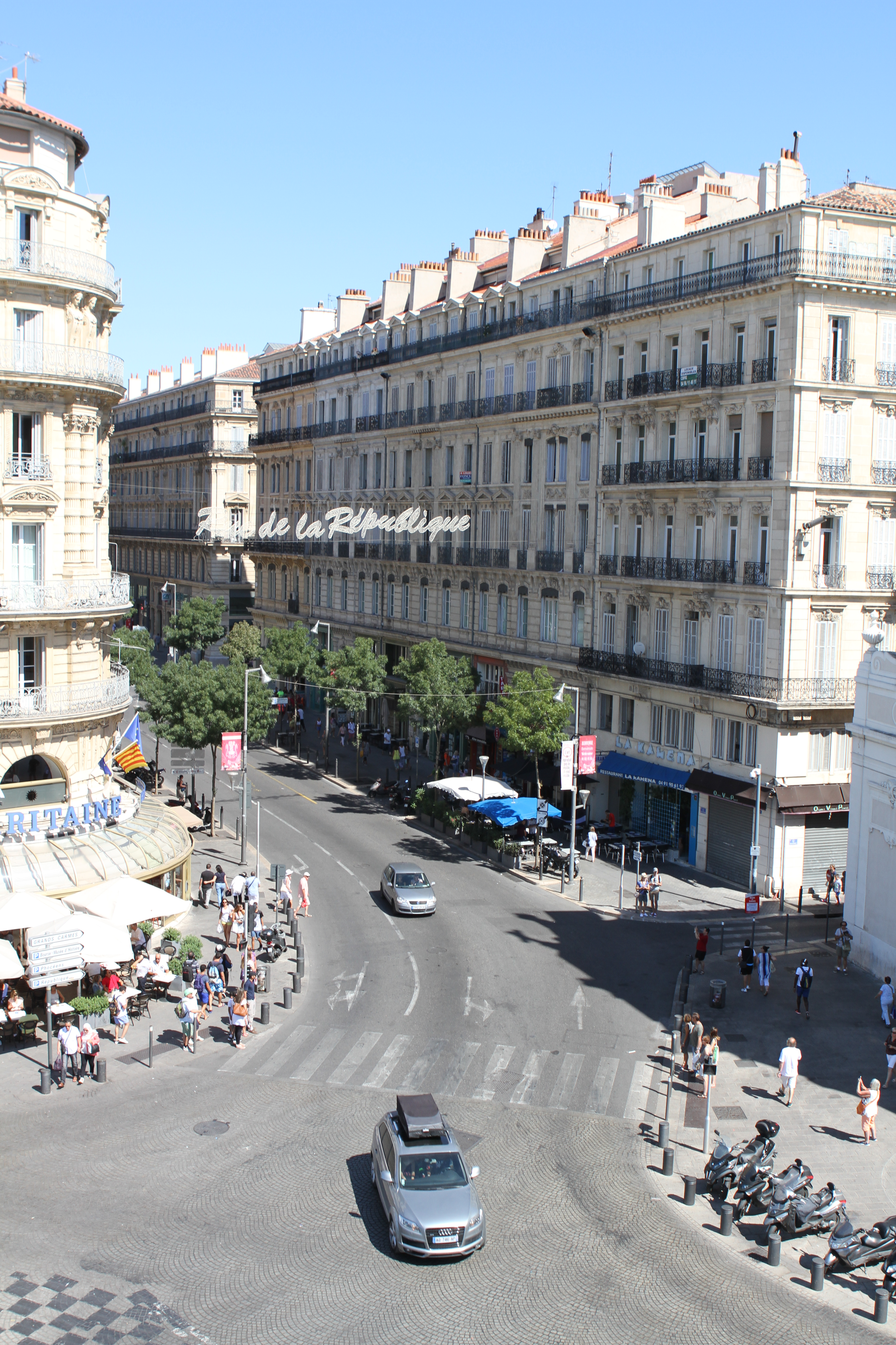 La rue de la République vue depuis la grande roue située quai des Belges (Marseille, France)